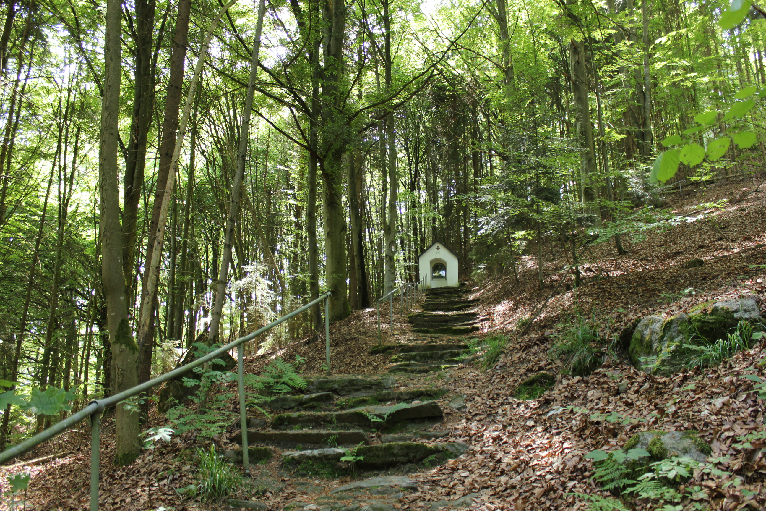 Landschaftsschutzgebiet Kalvarienberg in Gotteszell, Landkreis Regen. LSG 00163.01.